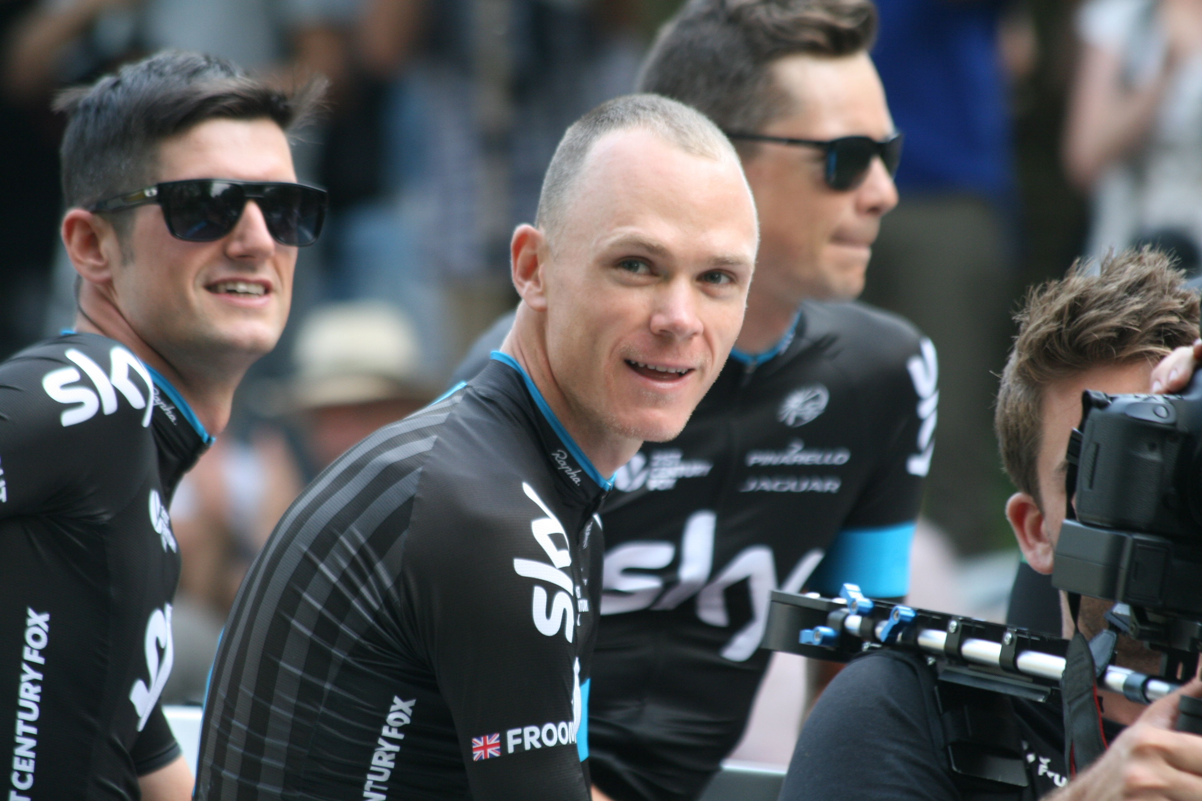 ploegenpresentatie Tour de France 2015 Utrecht